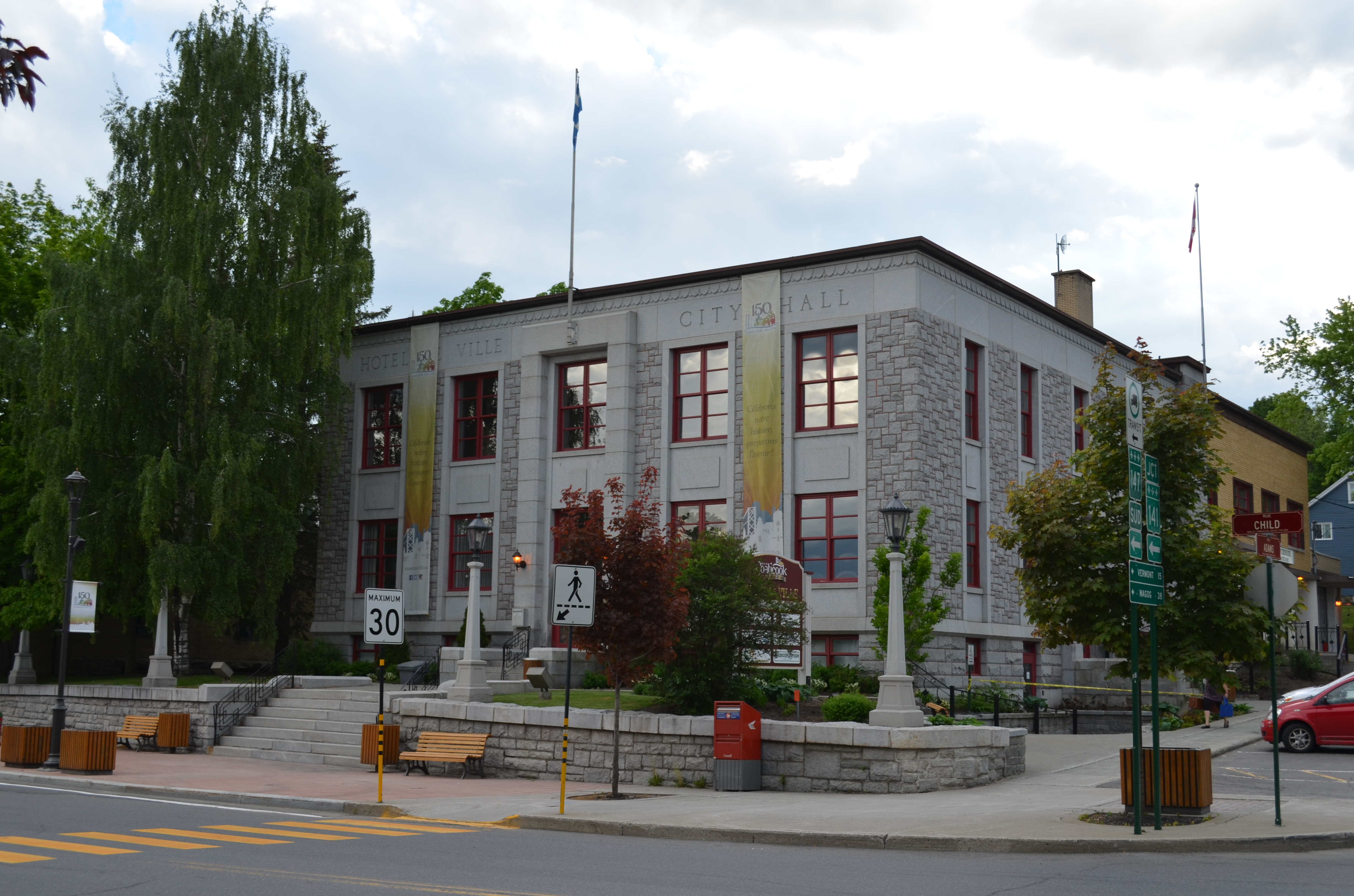 Hôtel de ville de Coaticook, sis au 150, rue Child.